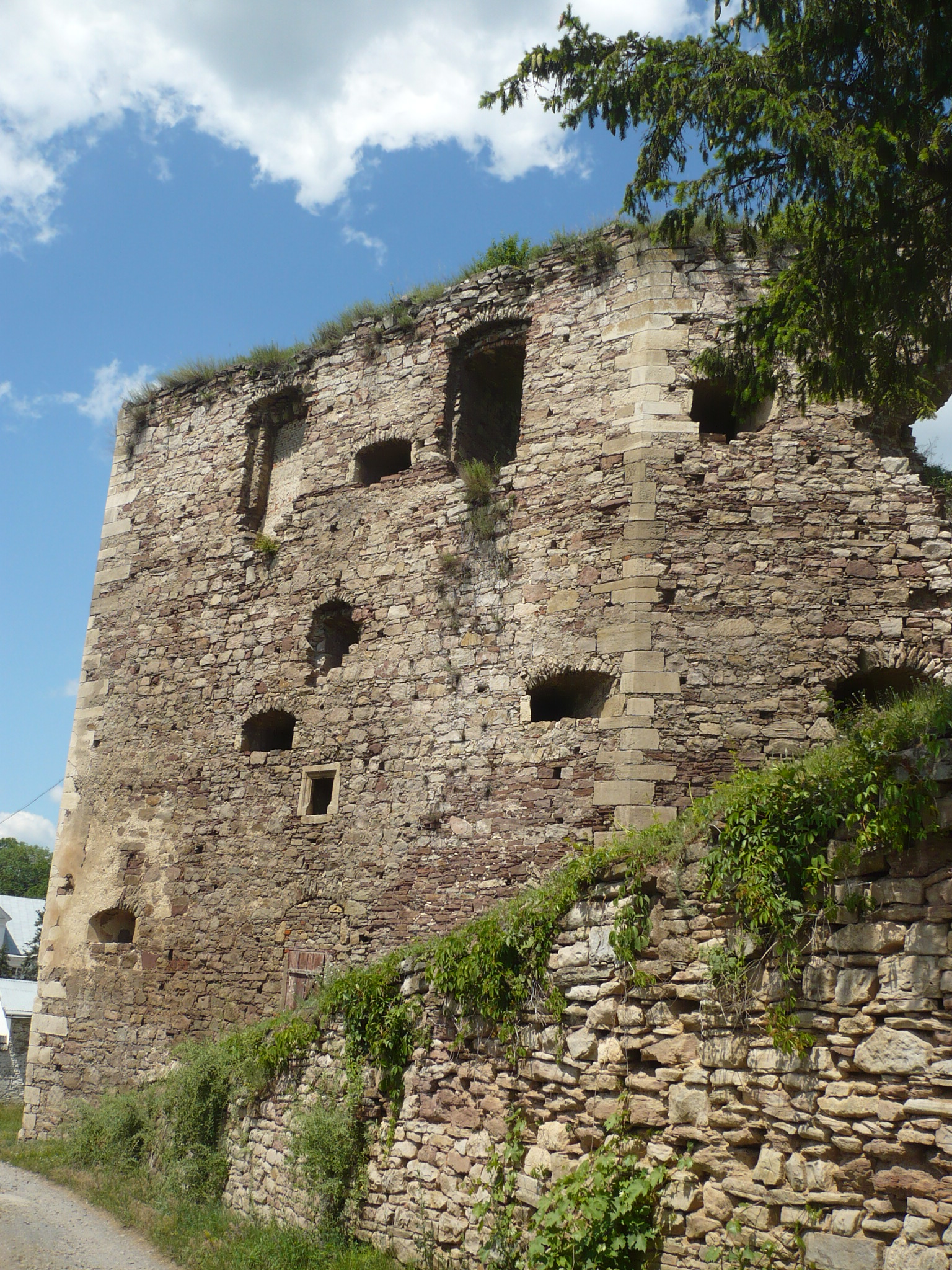 Jazłowiec. Zamek